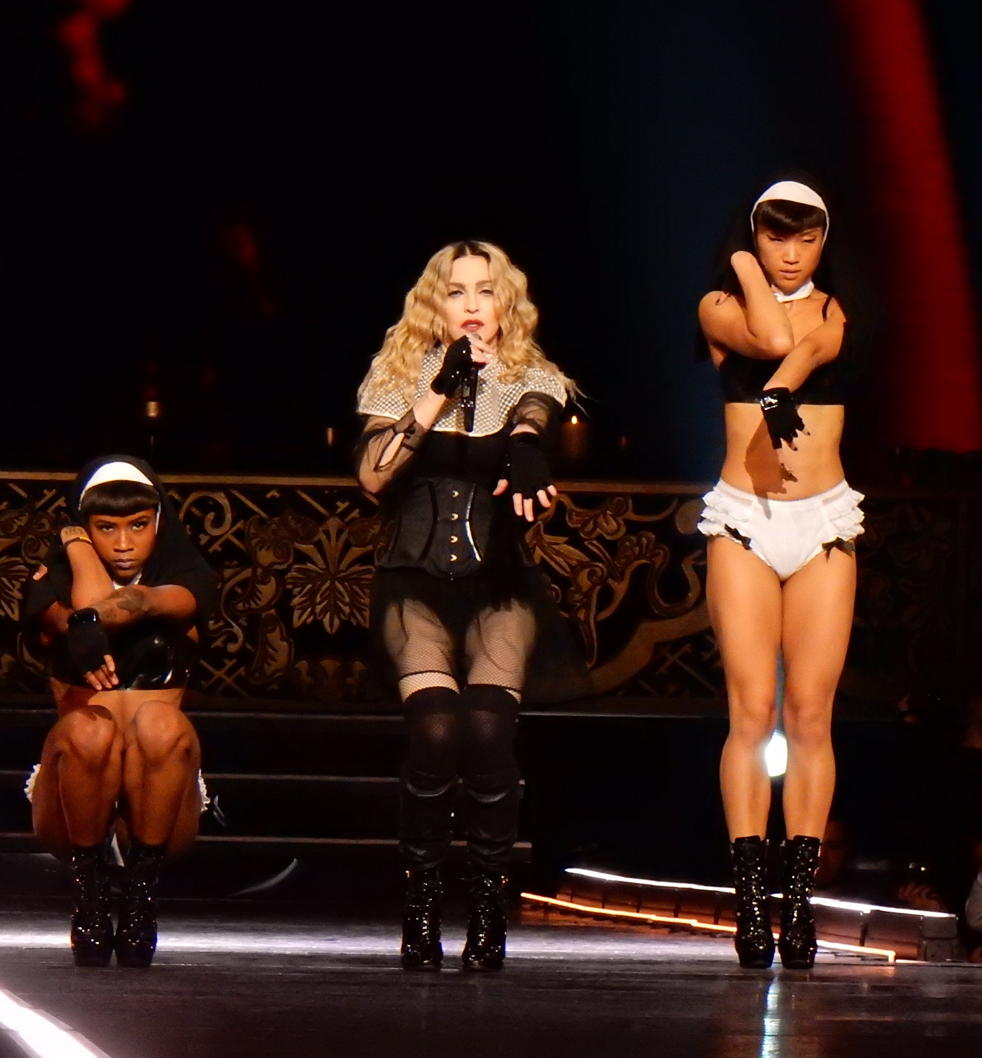 Madonna Rebel Heart Tour 2015 - Amsterdam 2